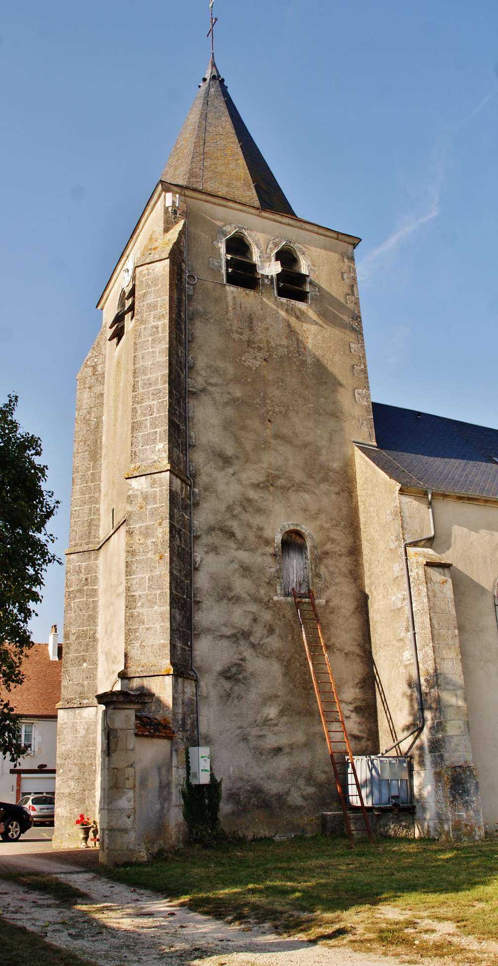 église ste Anne